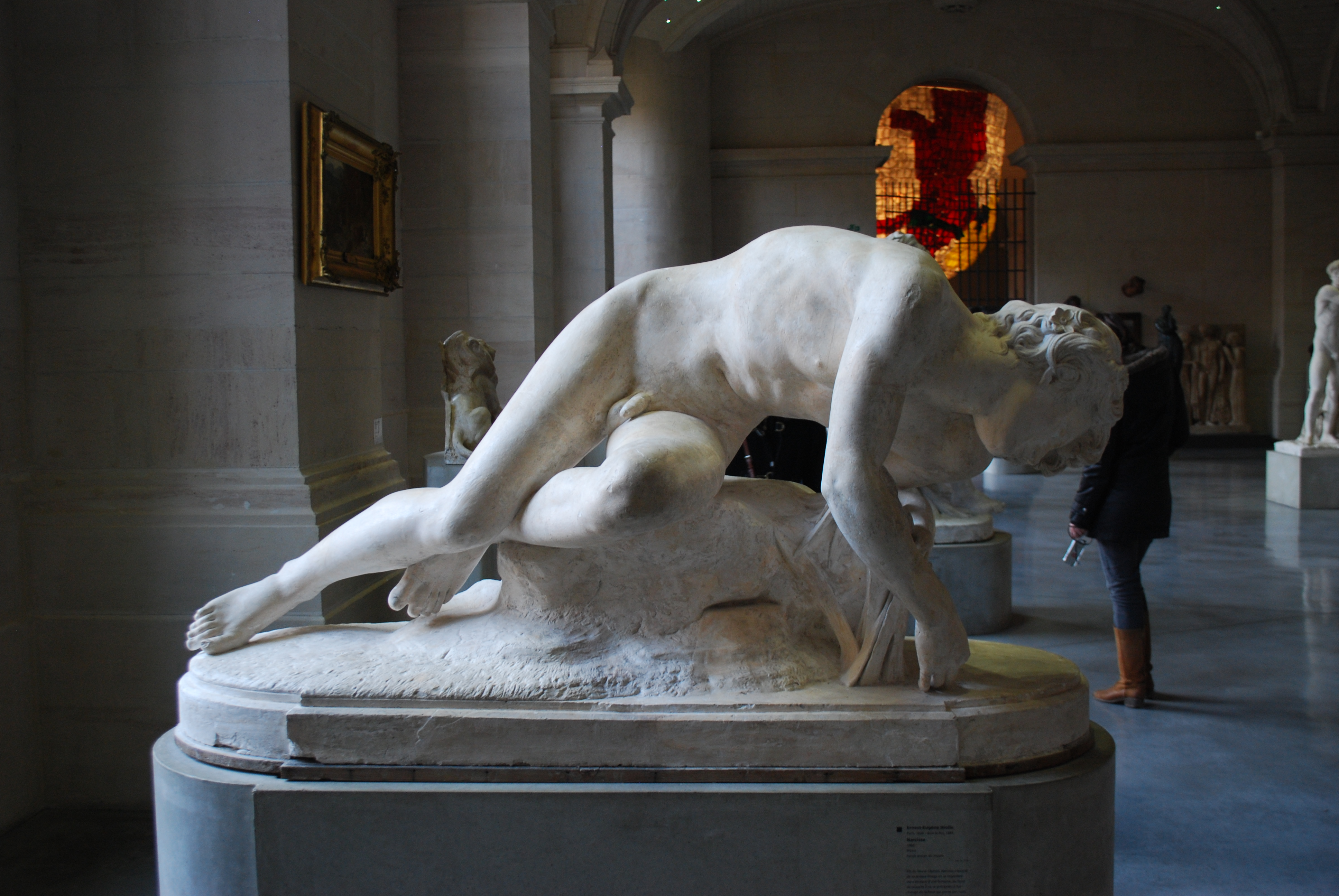 Narcisse, Département des sculptures, Palais des Beaux-Arts de Lille.